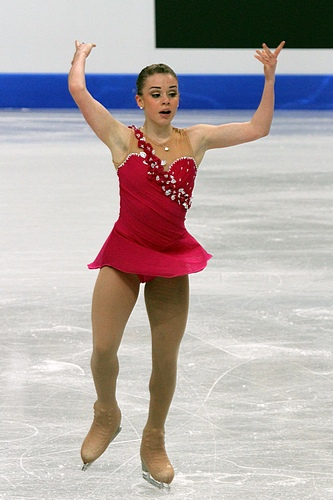 Изадора Вильямс (Бразилия) на чемпионате мира по фигурному катанию среди юниоров 2012